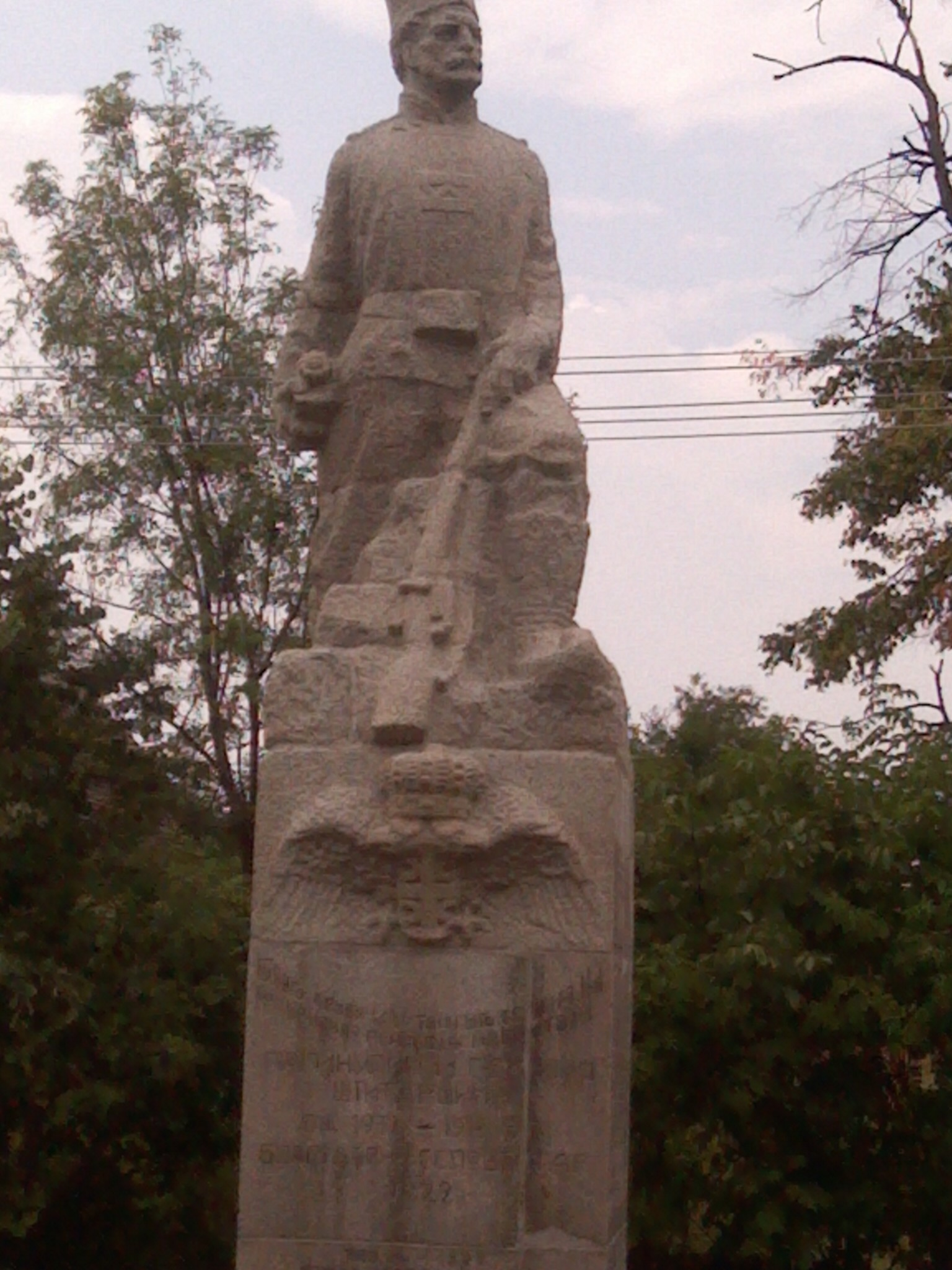 Споменик подигнут 1922. у част палим суграђанима Балаканских ратова 1912-1913. и Великог рата 1914-1918.